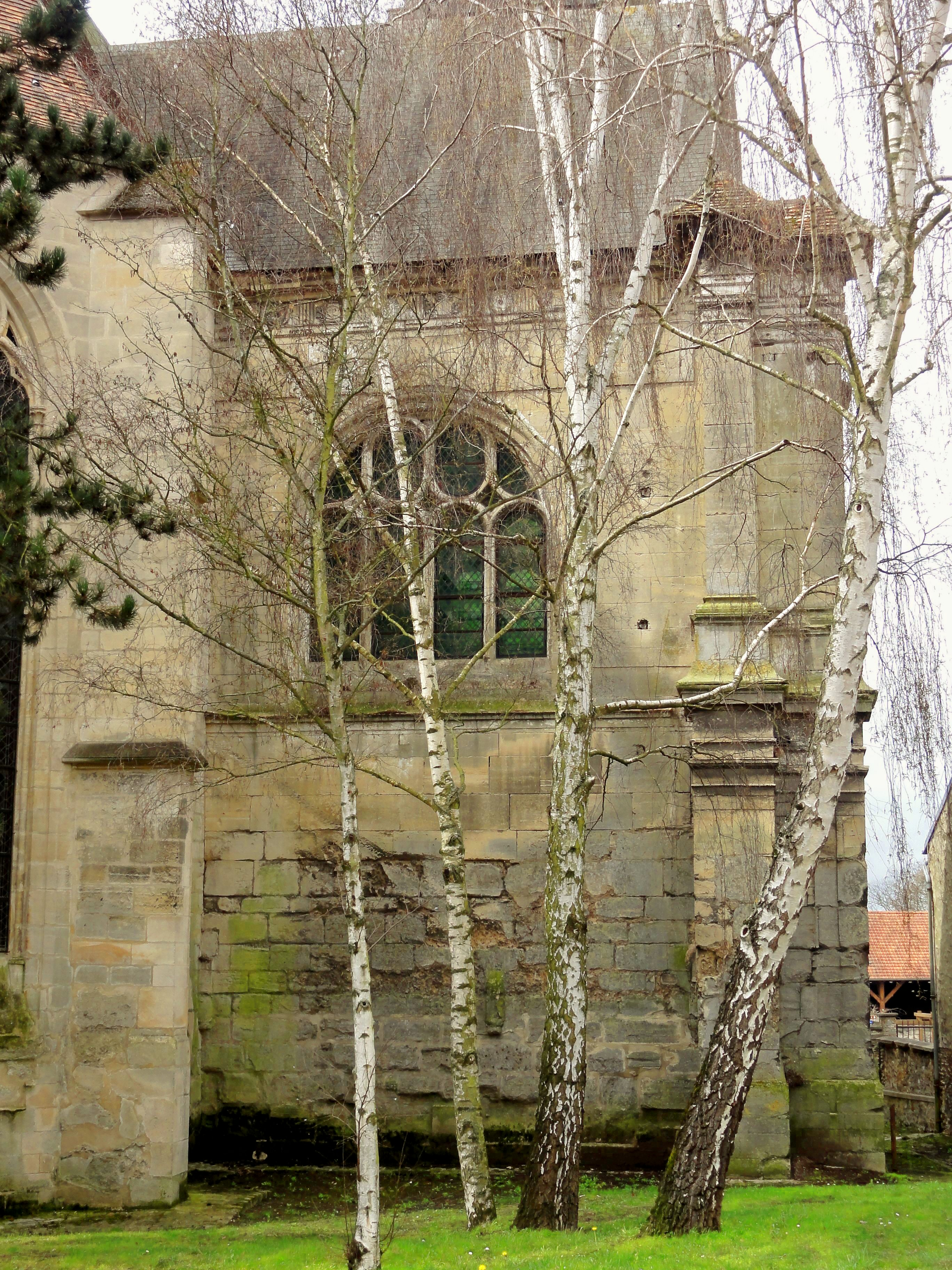 Croisillon nord ; vue depuis l'est.